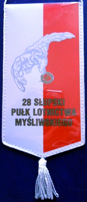 Proporczyk 28 plm.